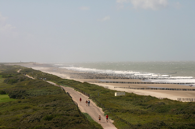 Zicht op een deel van het strand nabij Domburg